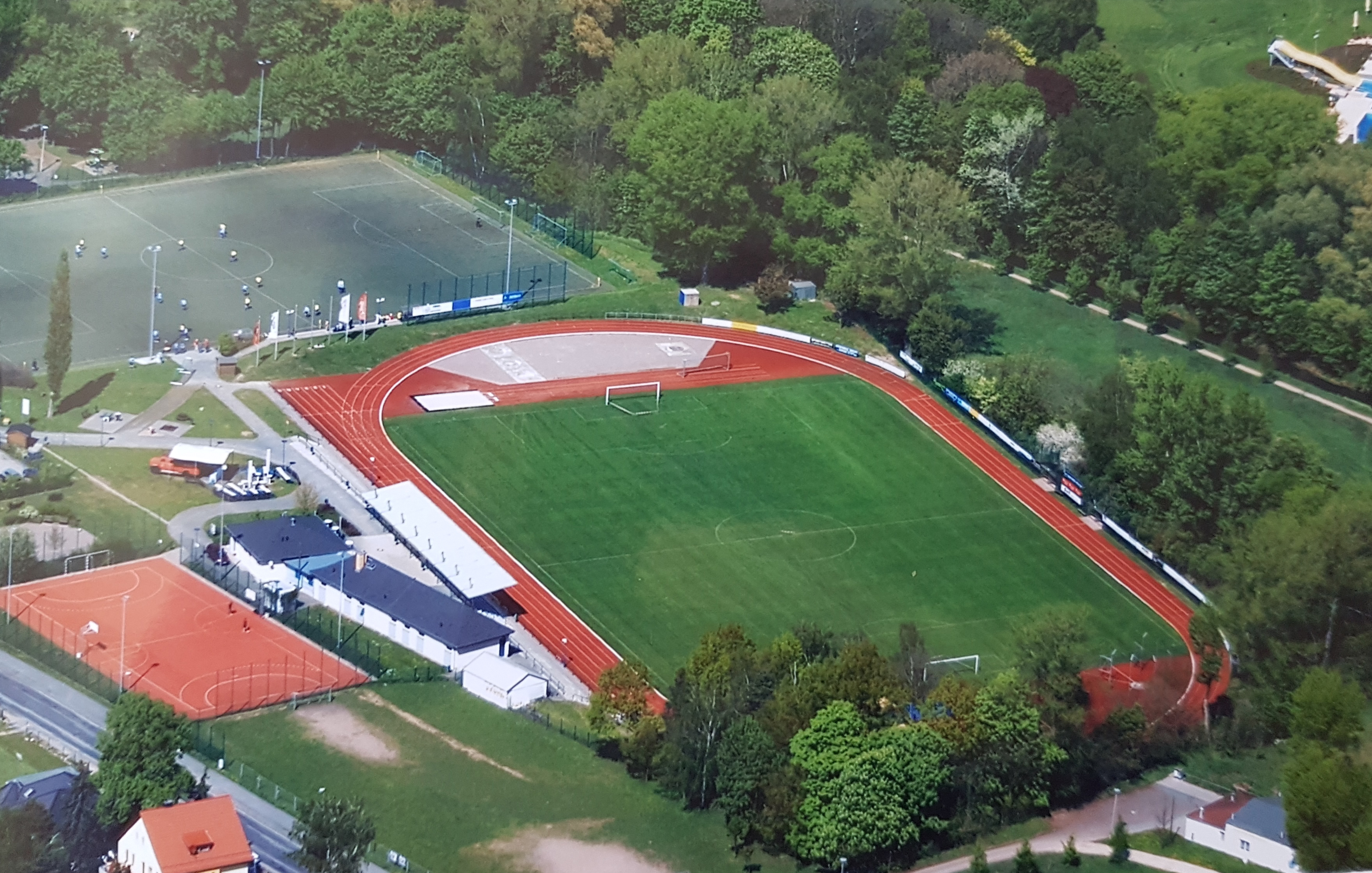 Luftaufnahme Sport- und Freizeitzentrum Taucha